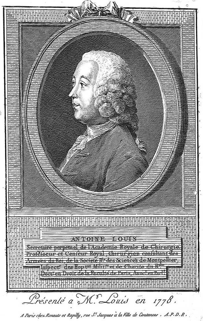 Portrait gravé du chirurgien Antoine Louis